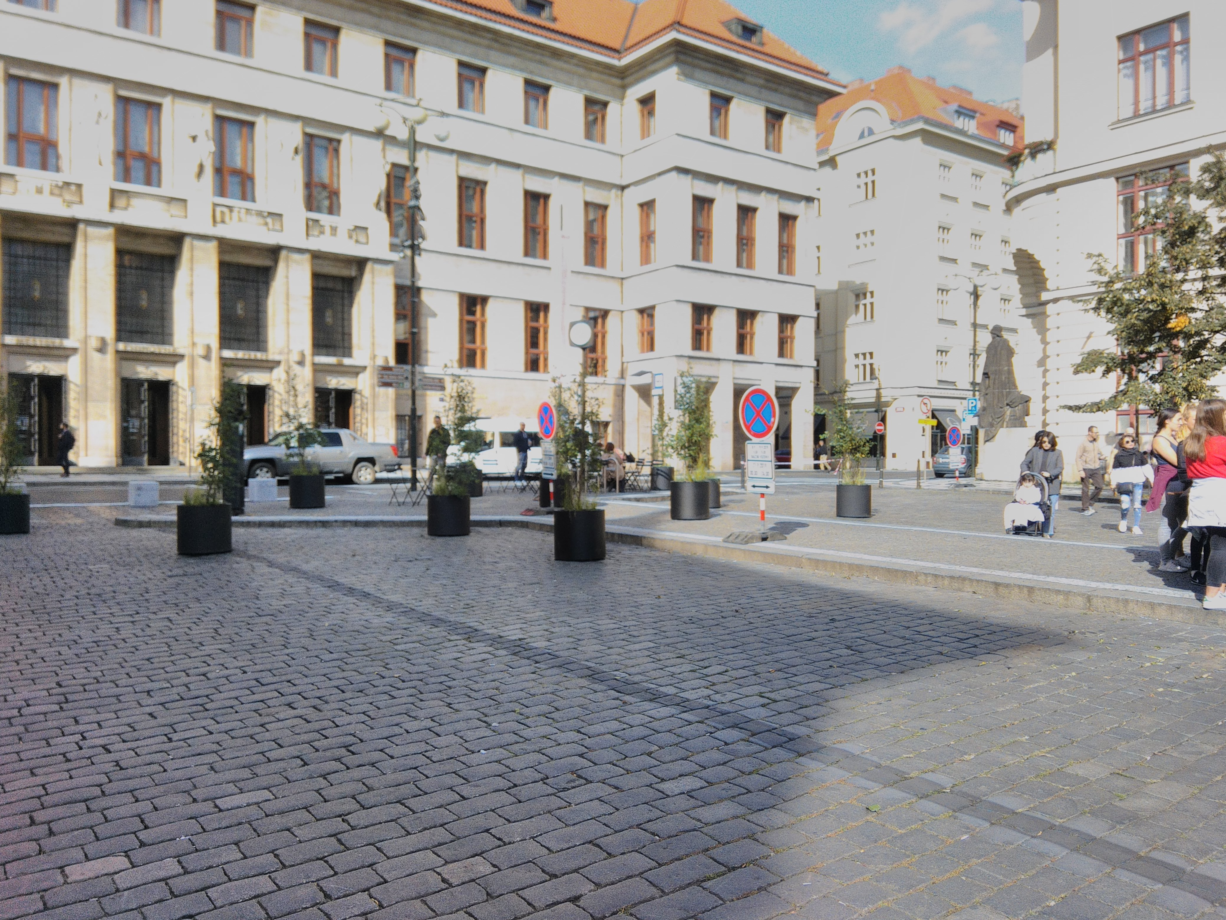 Stromy v Praze na Mariánském náměstí